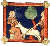 La Chasse à la licorne, miniature d’un manuscrit artésien du Bestiaire de Pierre de Beauvais, XIIIe siècle.